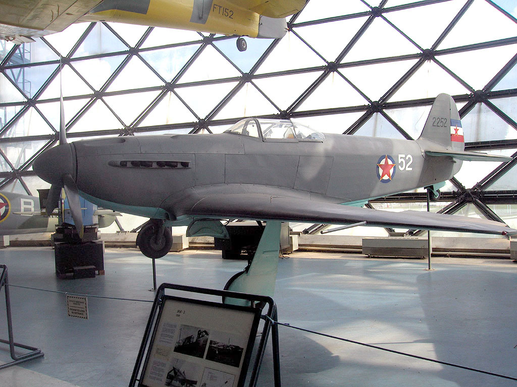 Yak 3, Belgrade Aviation Museum, Serbia.